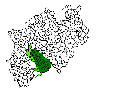 Karte der bergischen Städte und Gemeinden, Dunkelgrün bergisch nach heutigem Regionalbewusstsein, hellgrün sonstige bergische Städte und Gemeinden nach dem Gebietsstand 1789 des Herzogtum Bergs